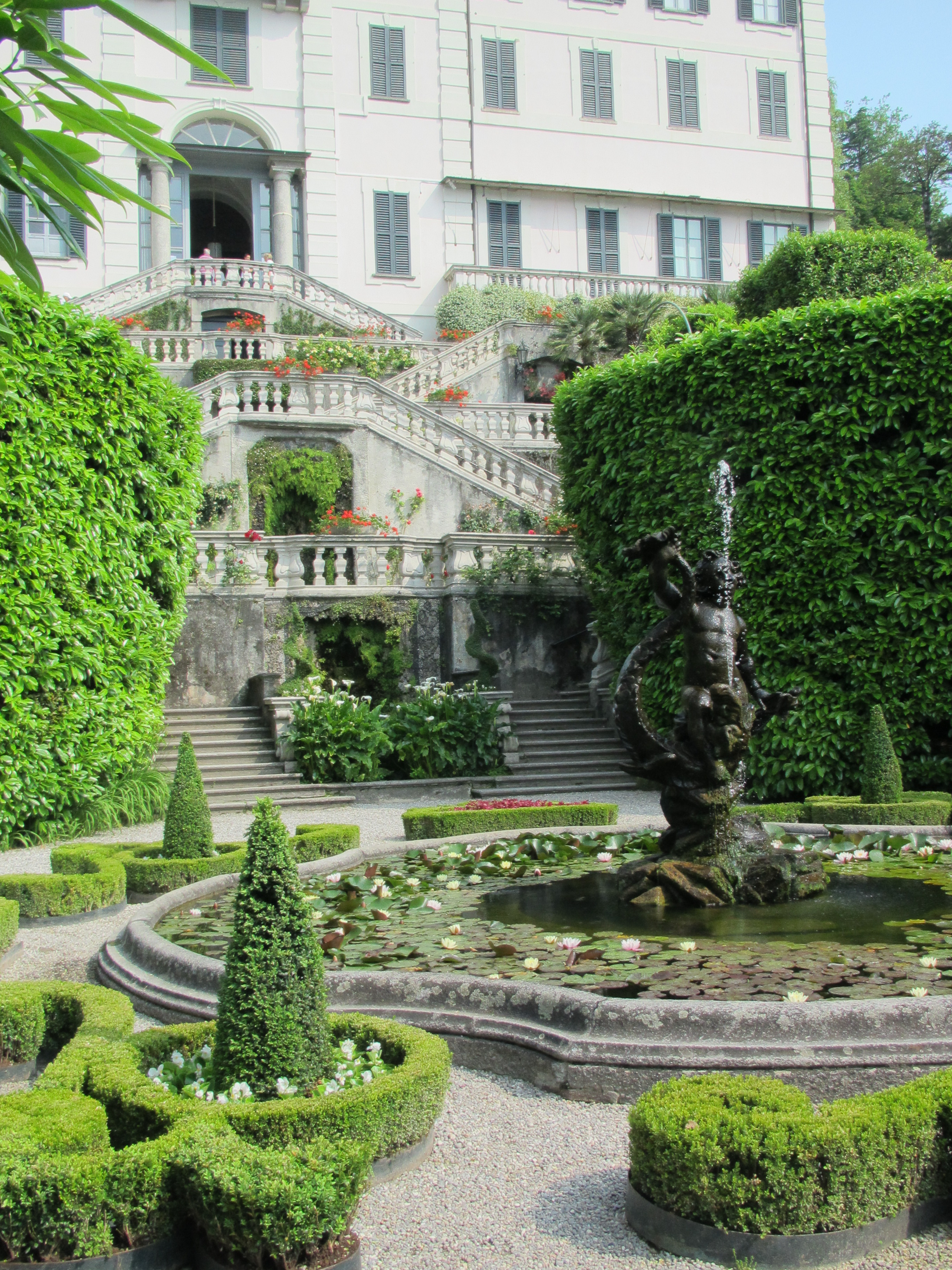 Villa Carlotta - museo e giardino botanico This is a photo of a monument which is part of cultural heritage of Italy.